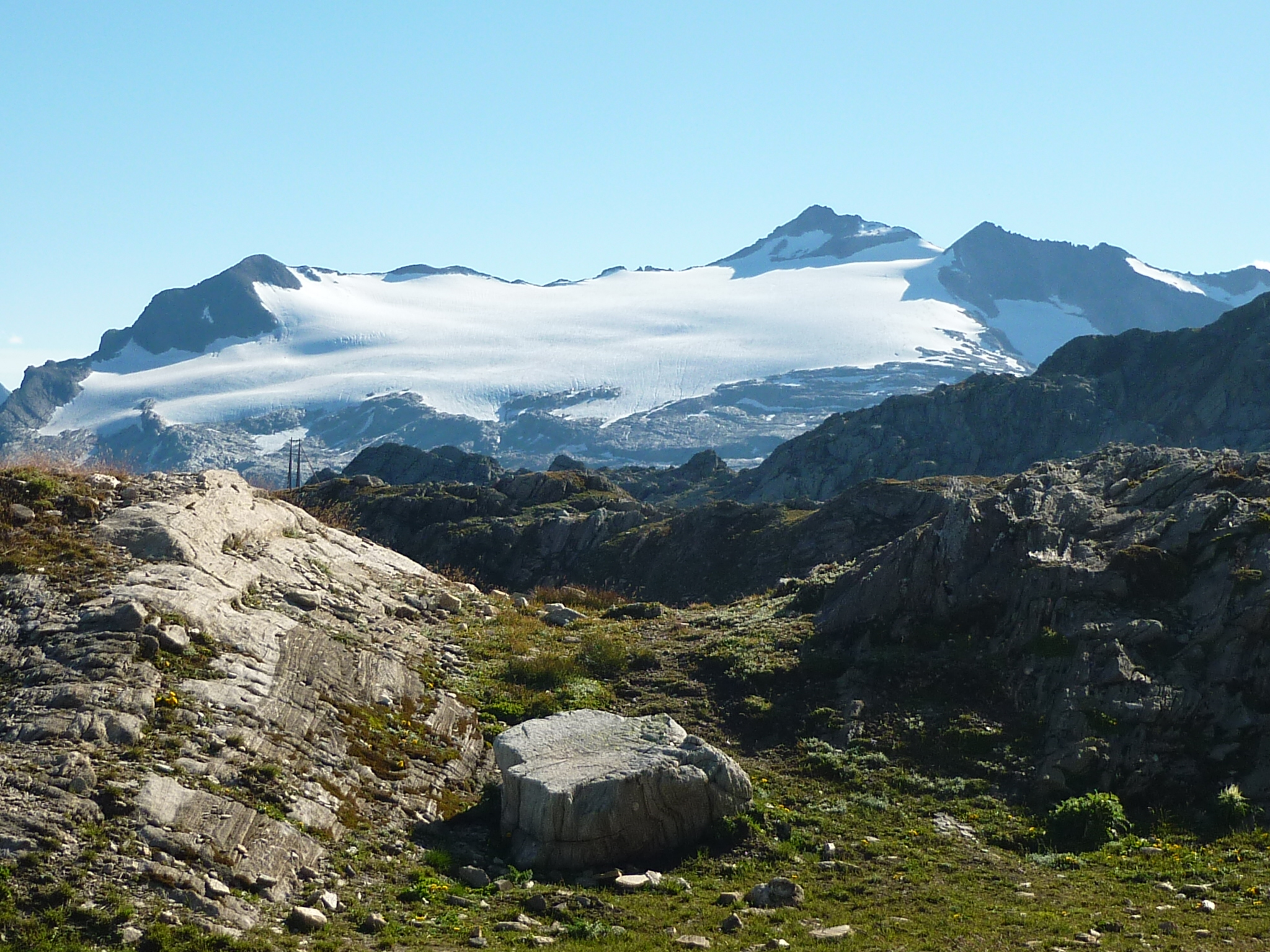 Basodino TI, Schweiz